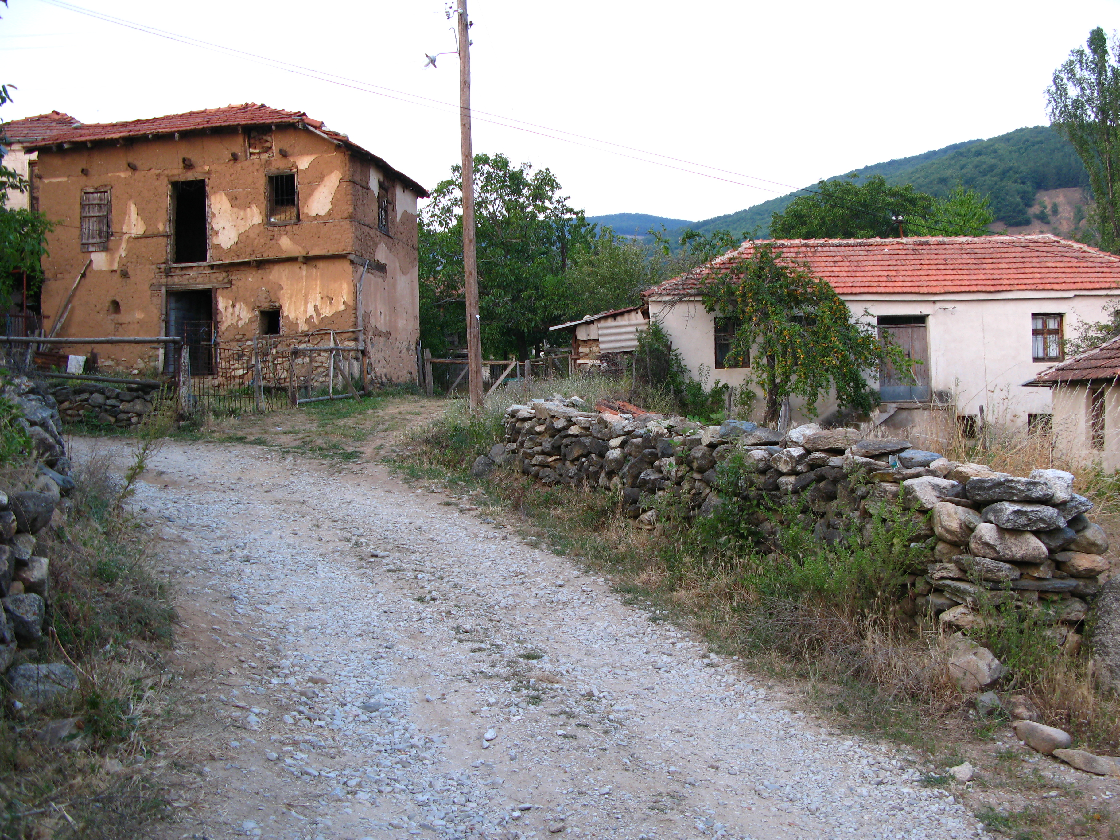 Стари къщи в битолското село Сърбци.